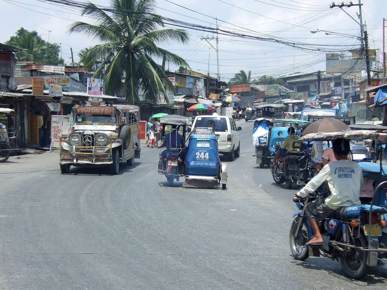 Litex,Quezon,Metro-Manila,Philippines